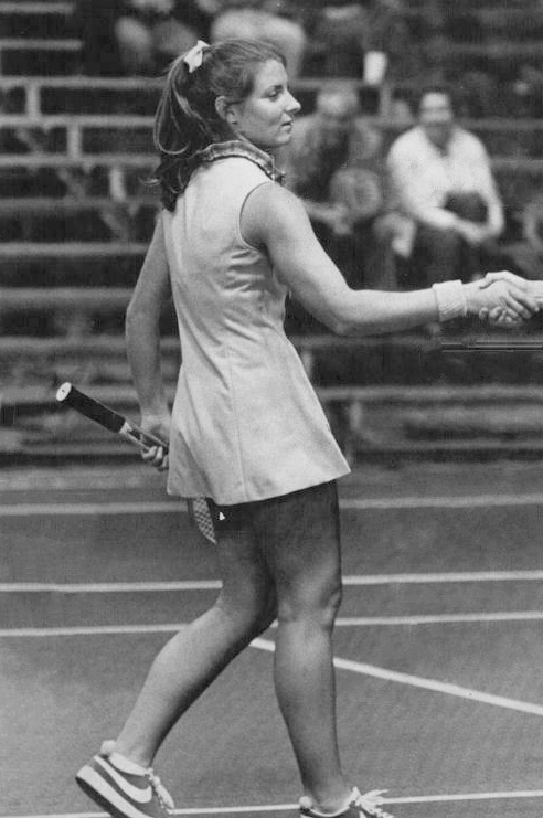 1969 Press Photo Valerie Ziegenfuss